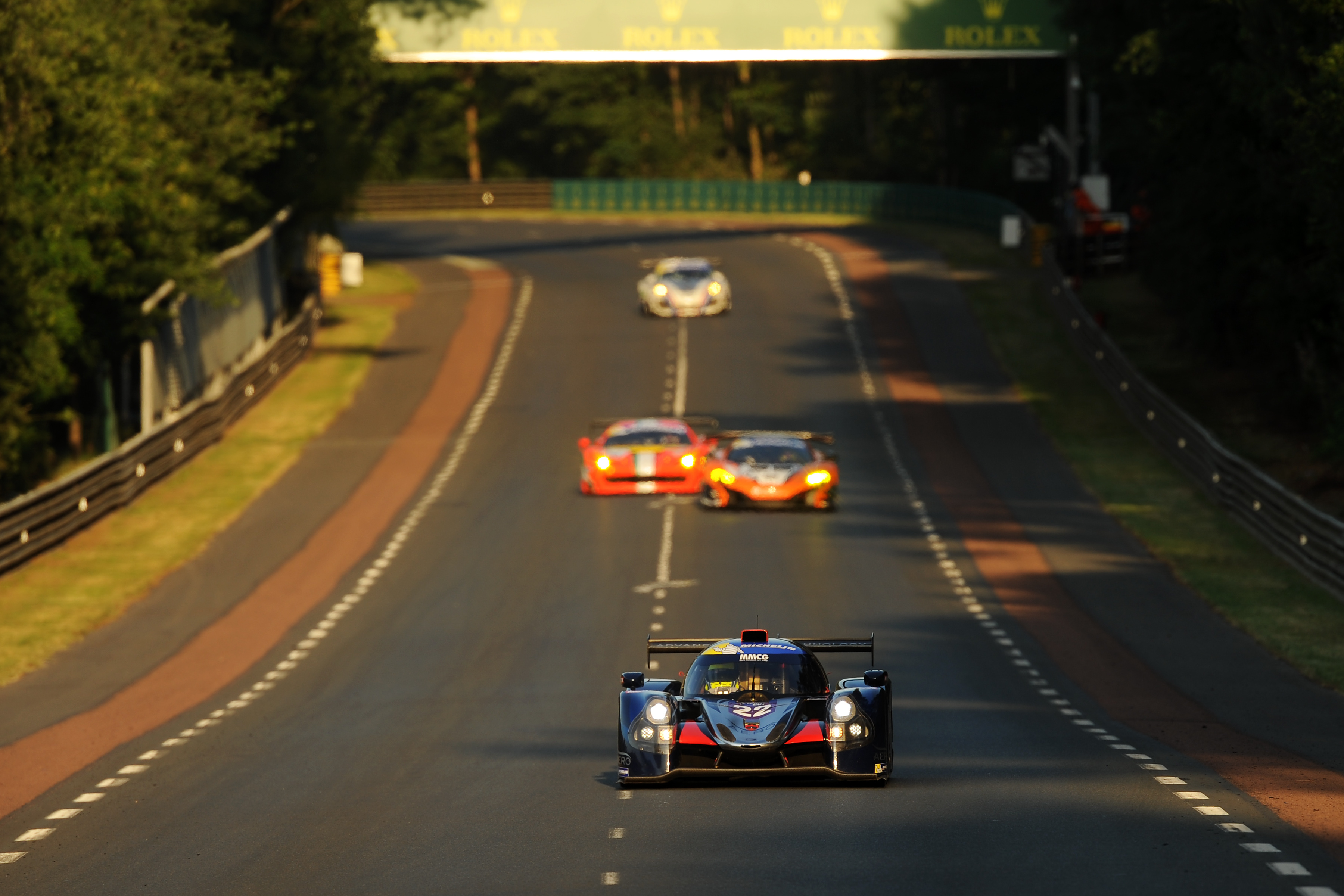 United Autosport lors des 24 Heures du Mans 2017.